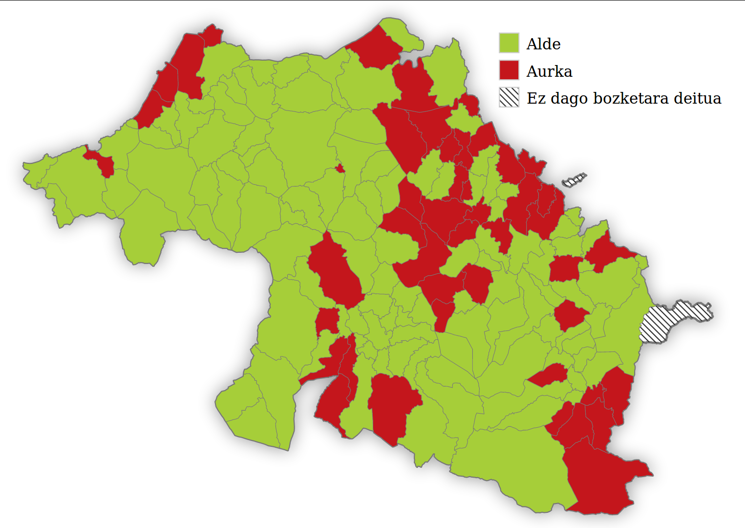 ARGIA.eus-erako egin nuen infografian oinarritua